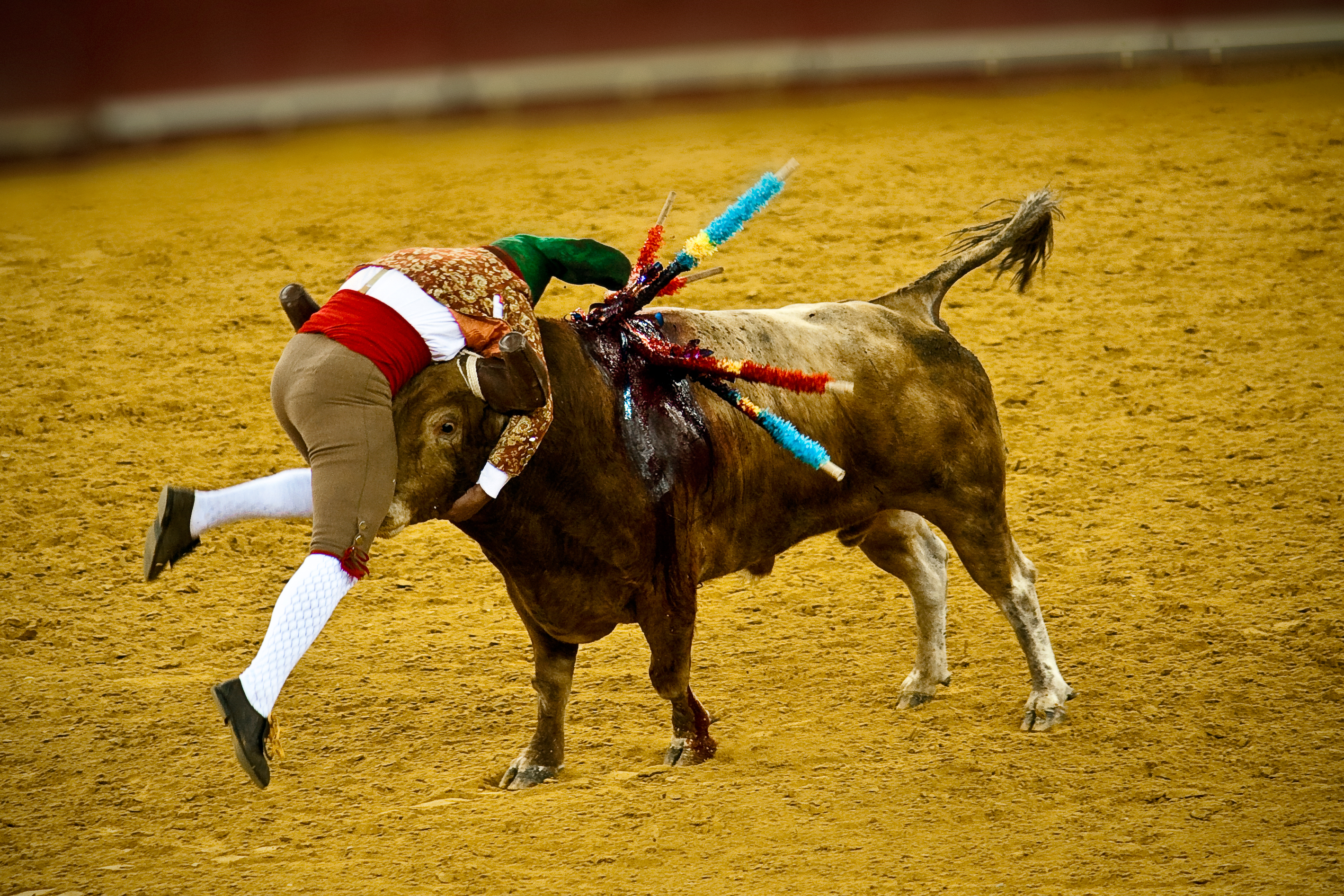 Forcado numa Pega de Caras no Campo Pequeno.